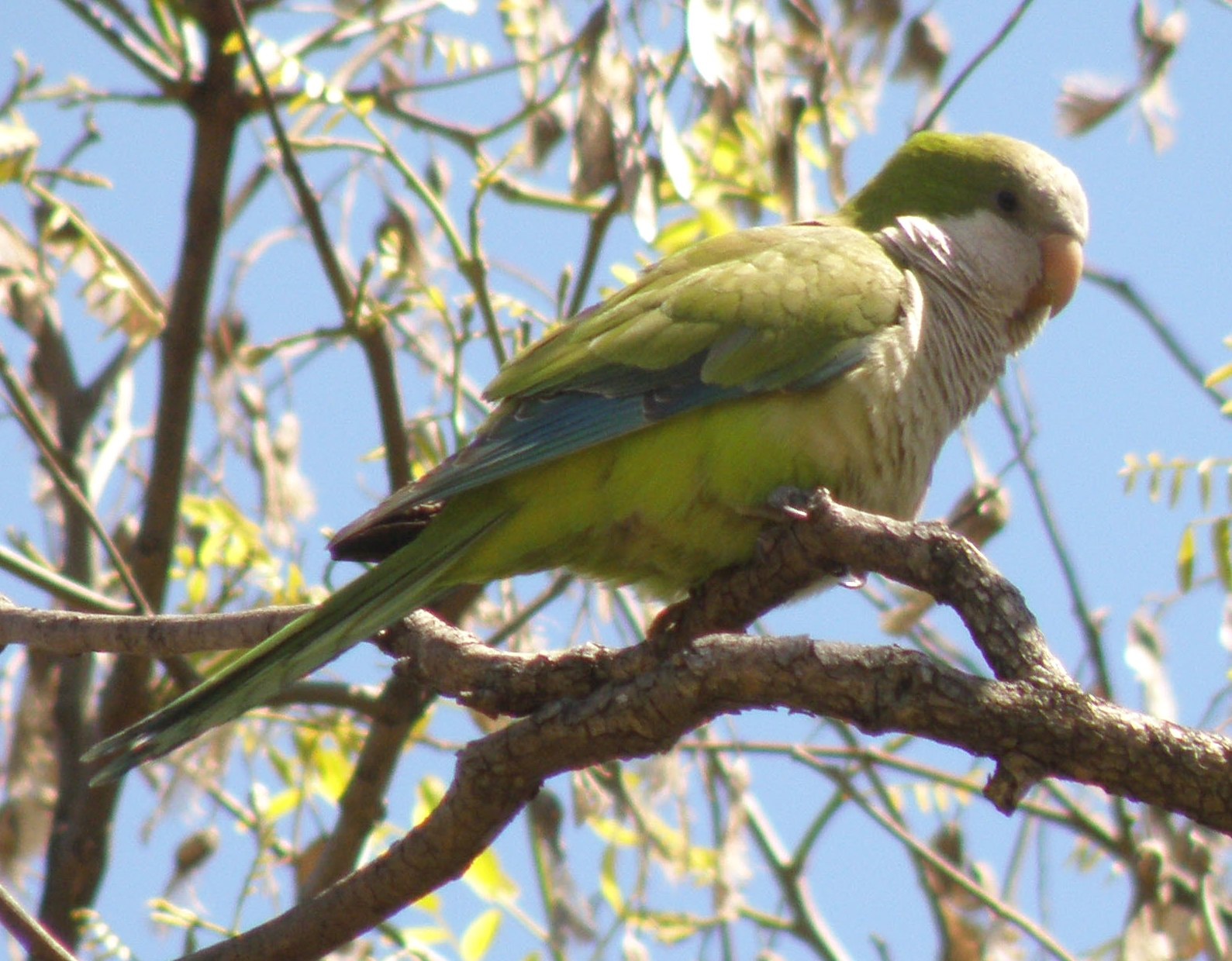 Myiopsitta monachus monachus en la "reserva ecológica de Buenos Aires".